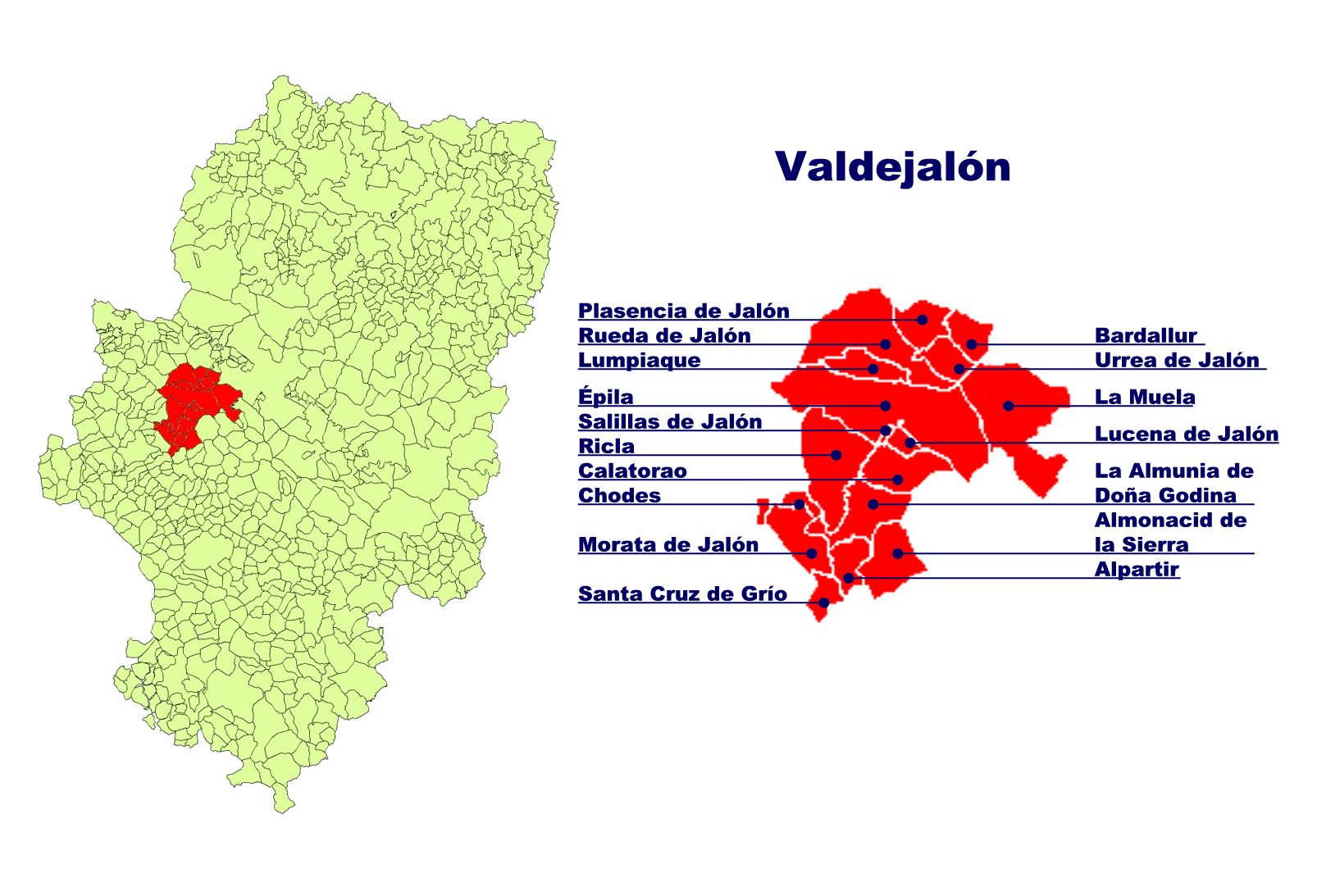 Comarca de Valdejalón Creado el 02.10.2005 por Ecelan en base a Image:Aragon municipalities.png